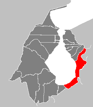 Ubicación del cantón Gibraltar de la provincia de Maracaibo.